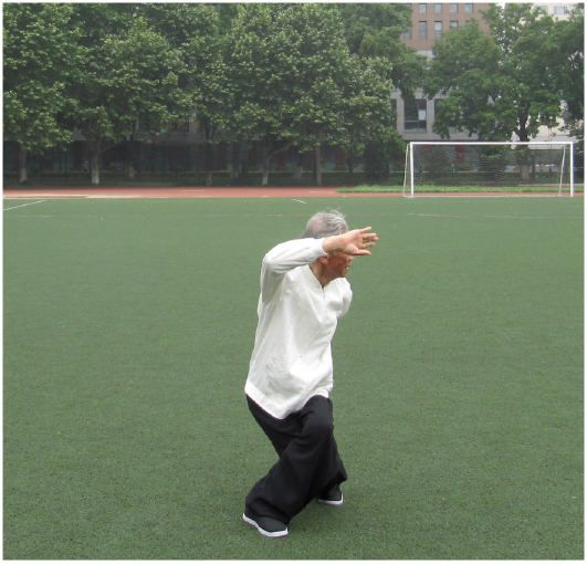 Abschnitt 4: Die von den Fünf Anstrengungen und Sieben Betrübnissen verursachten Krankheiten vertreiben